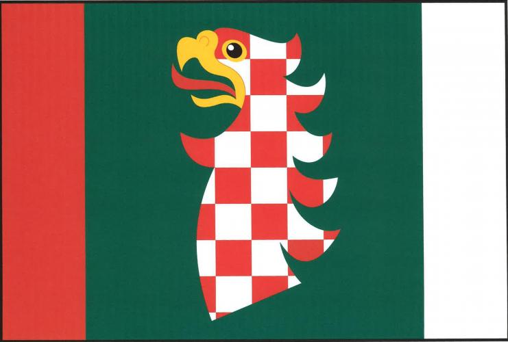 Nelešovice vlajka